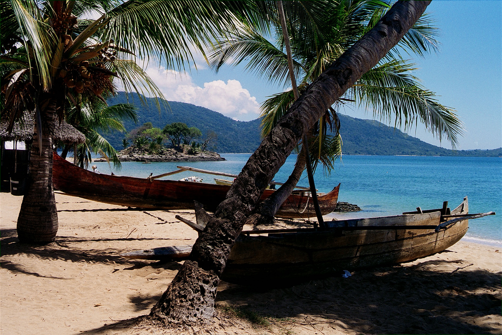 Pirogue sur la plage de Nosy Komba